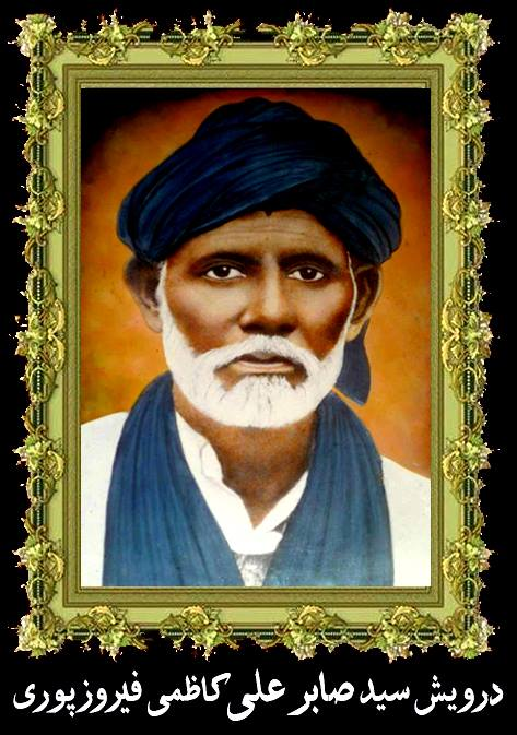 سید صابر علی شاہ کاظمی المشہدی فیروزپوری المعروف سائیں صابر شاہ